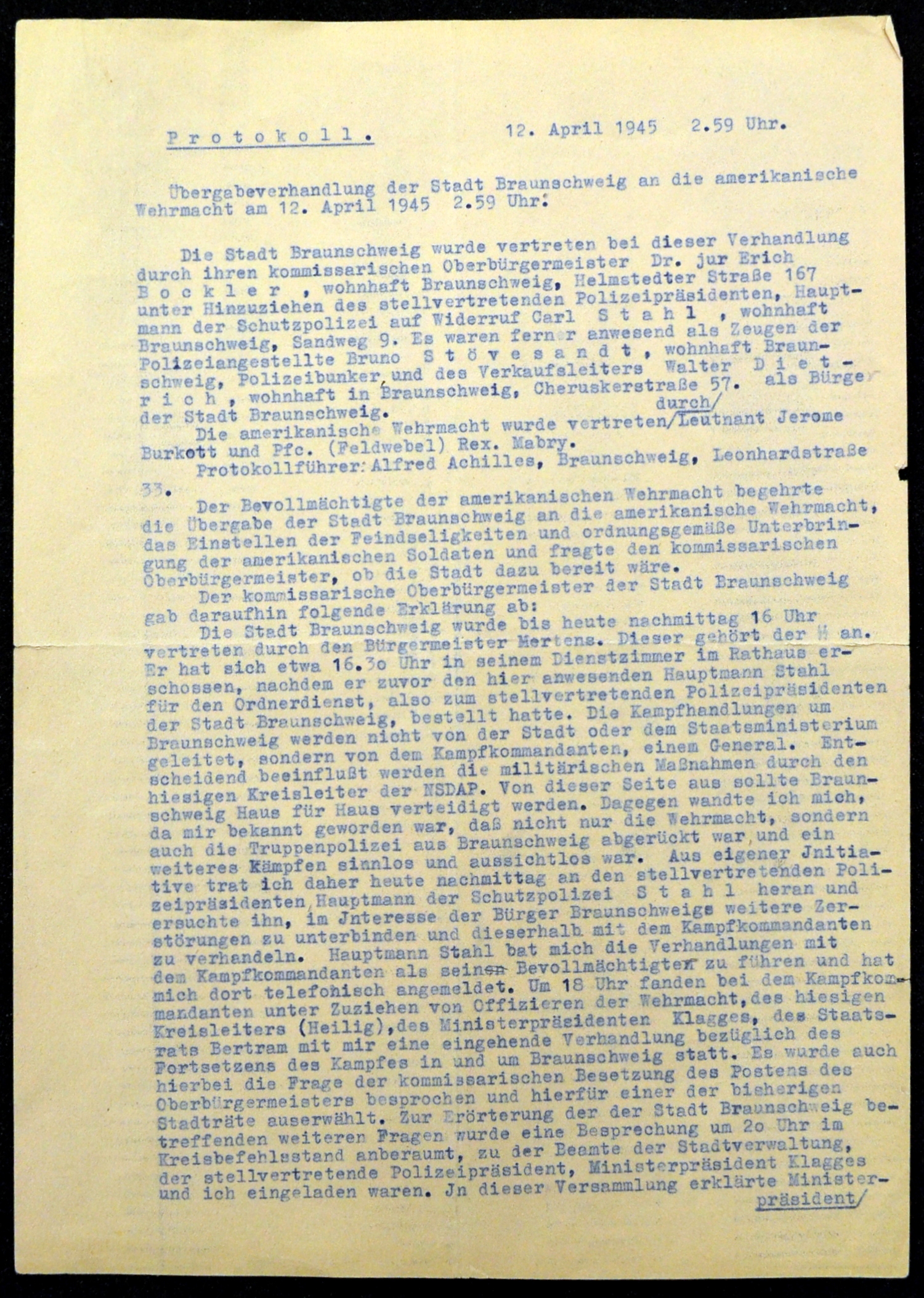 Übergabe der Stadt Braunschweig: Übergabeprotokoll (Seite 1) vom 12. April 1945.